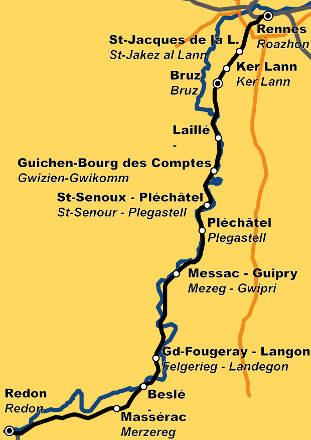 Ligne de chemin de fer Rennes–Redon